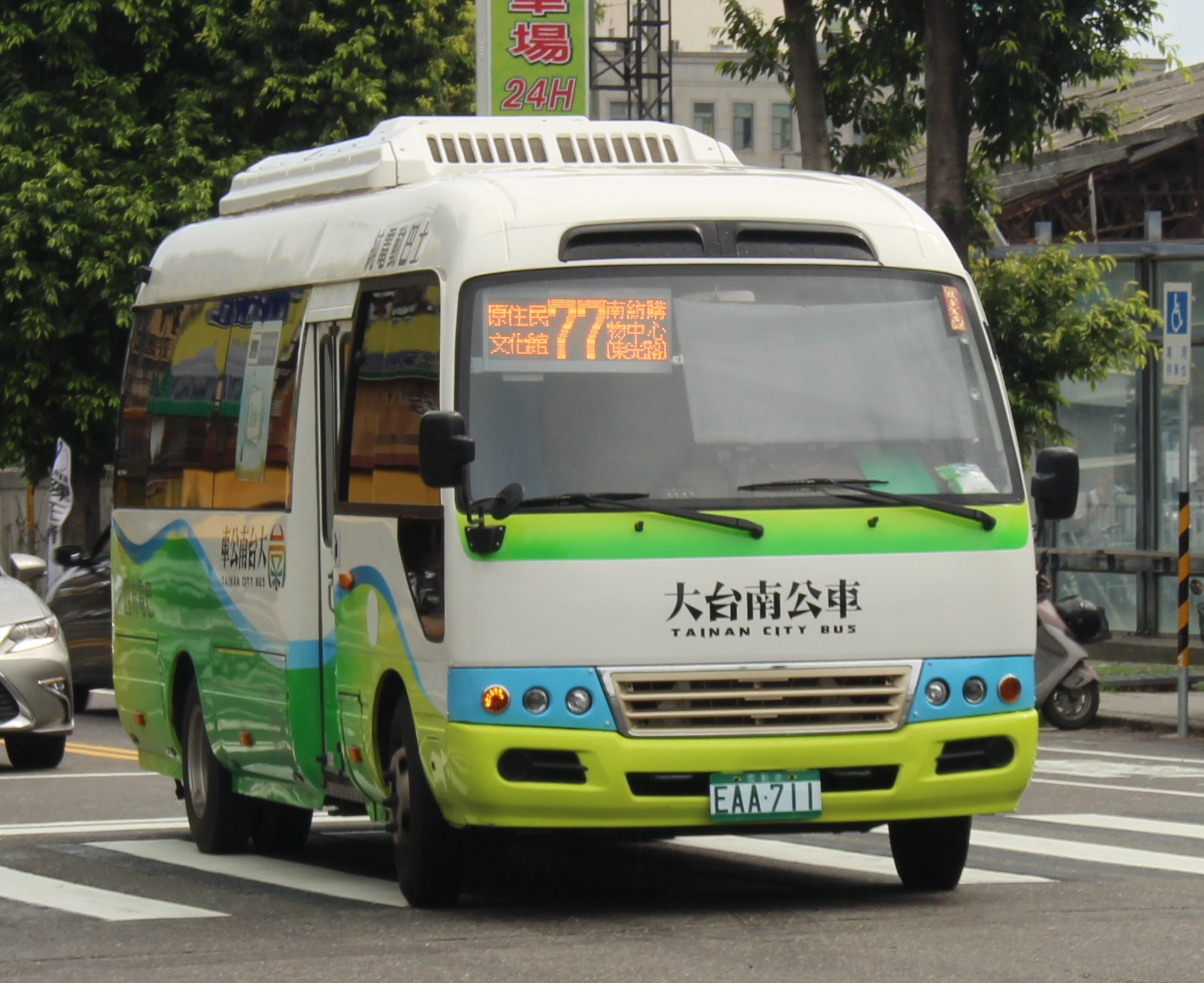 四方客運純電動中型巴士 EAA-711 台南市公車77路